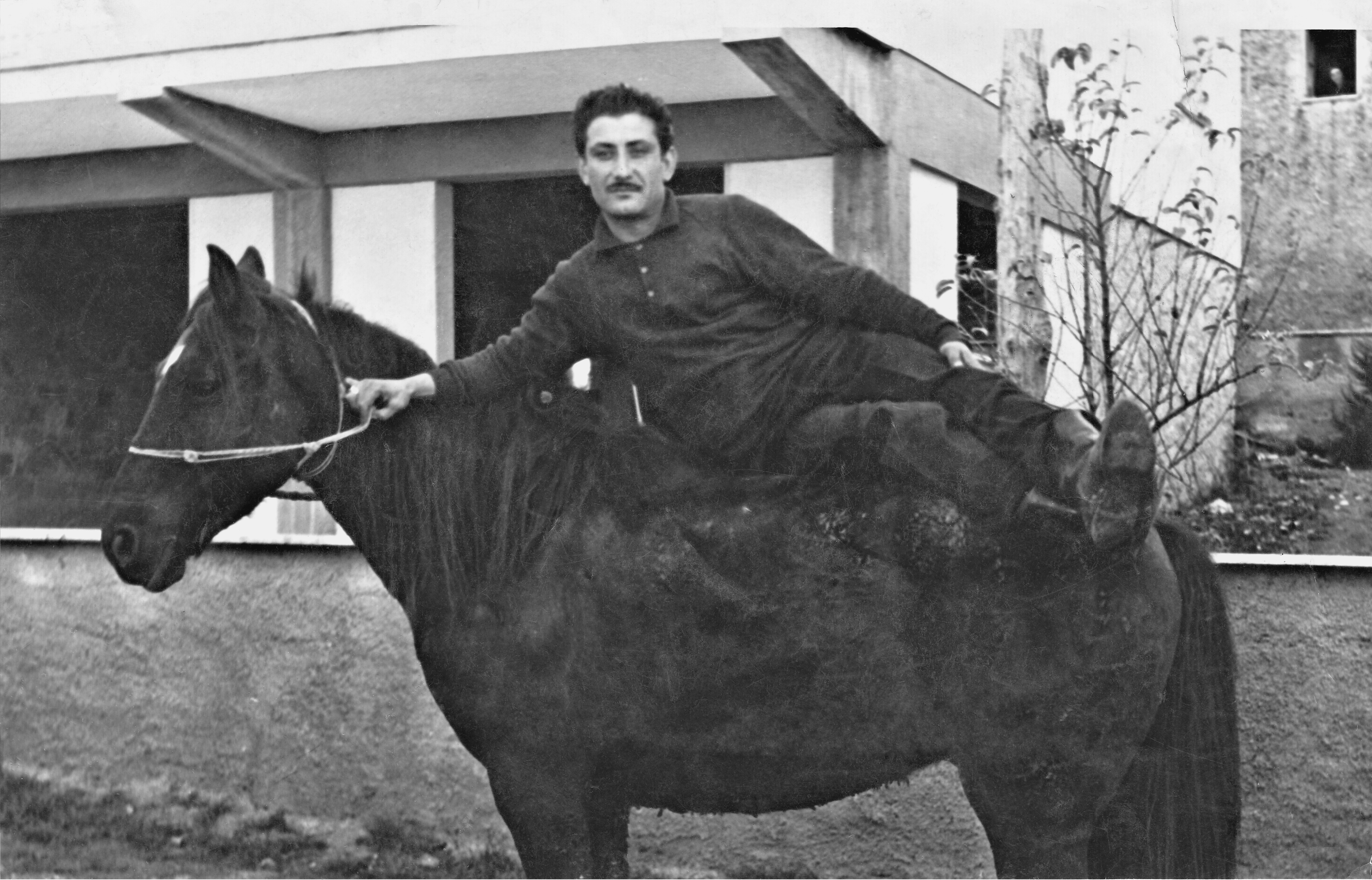 Rom abruzzese con il suo cavallo in un accampamento a Milano nel 1970 circa